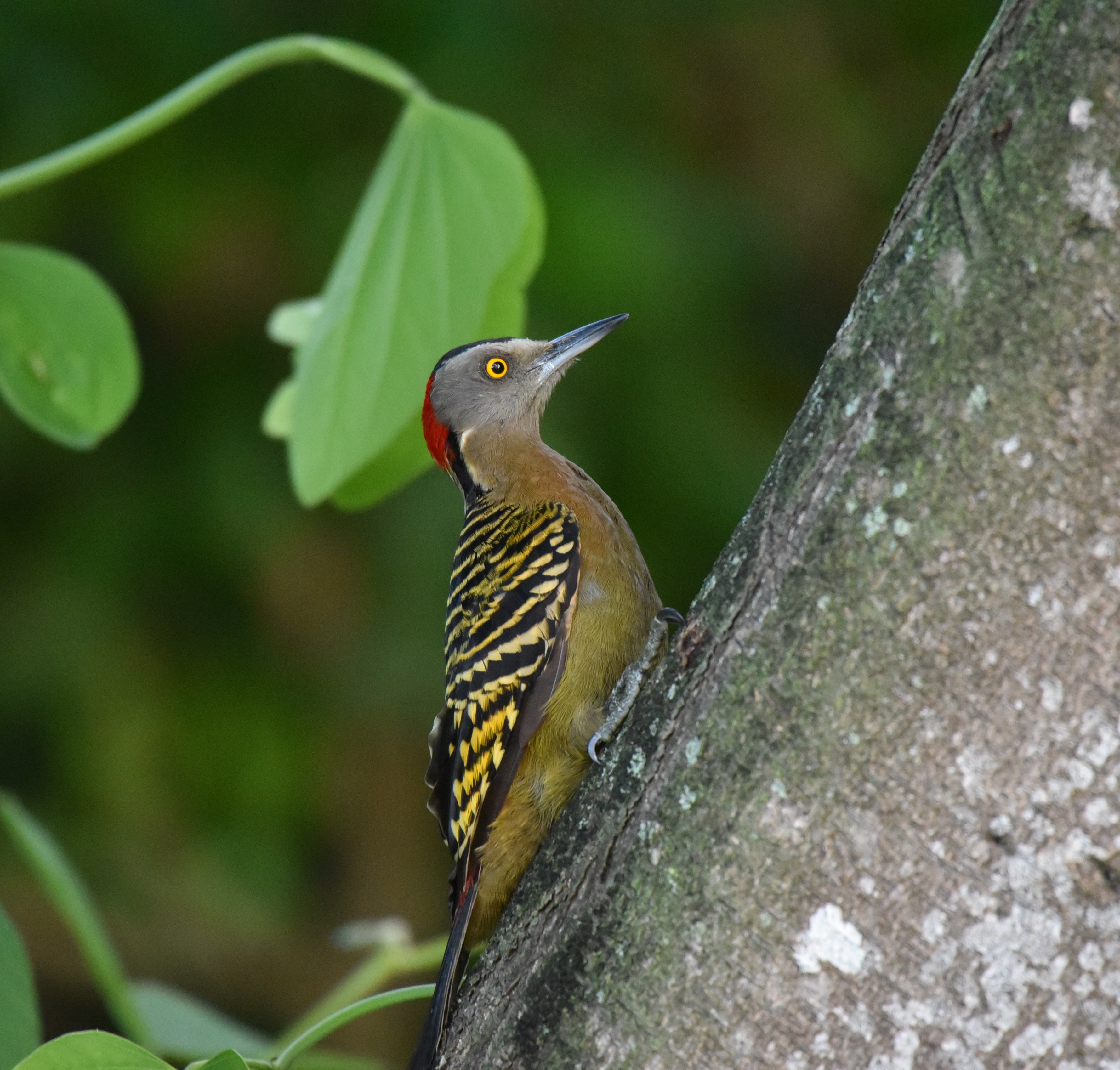 Haitispecht Melanerpes striatus Aufnahme Punta Cana